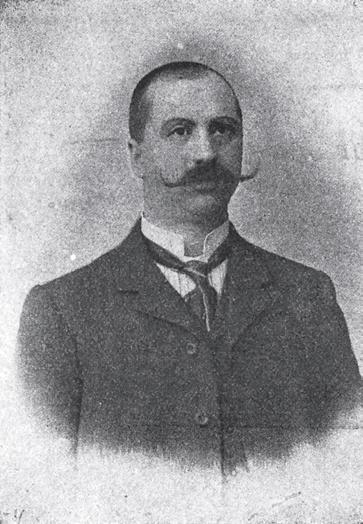 Александър Чакъров (1969-1910)